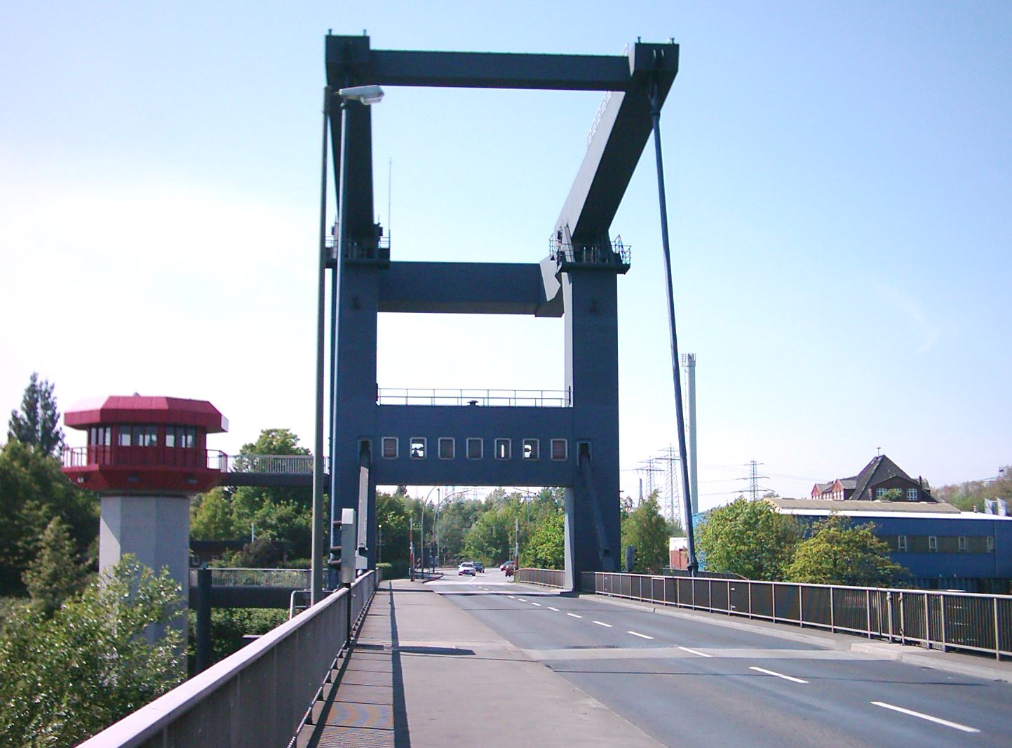 Die Reiherstieg Klappbrücke in Hamburg-Wilhelmsburg .